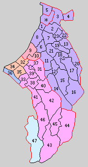 大阪府泉北郡の町村。